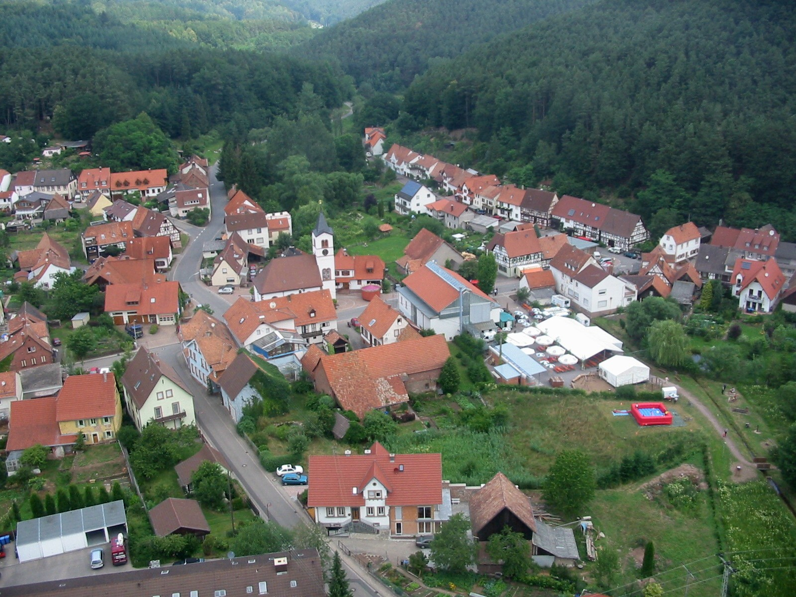 Spirkelbach - Luftaufnahme